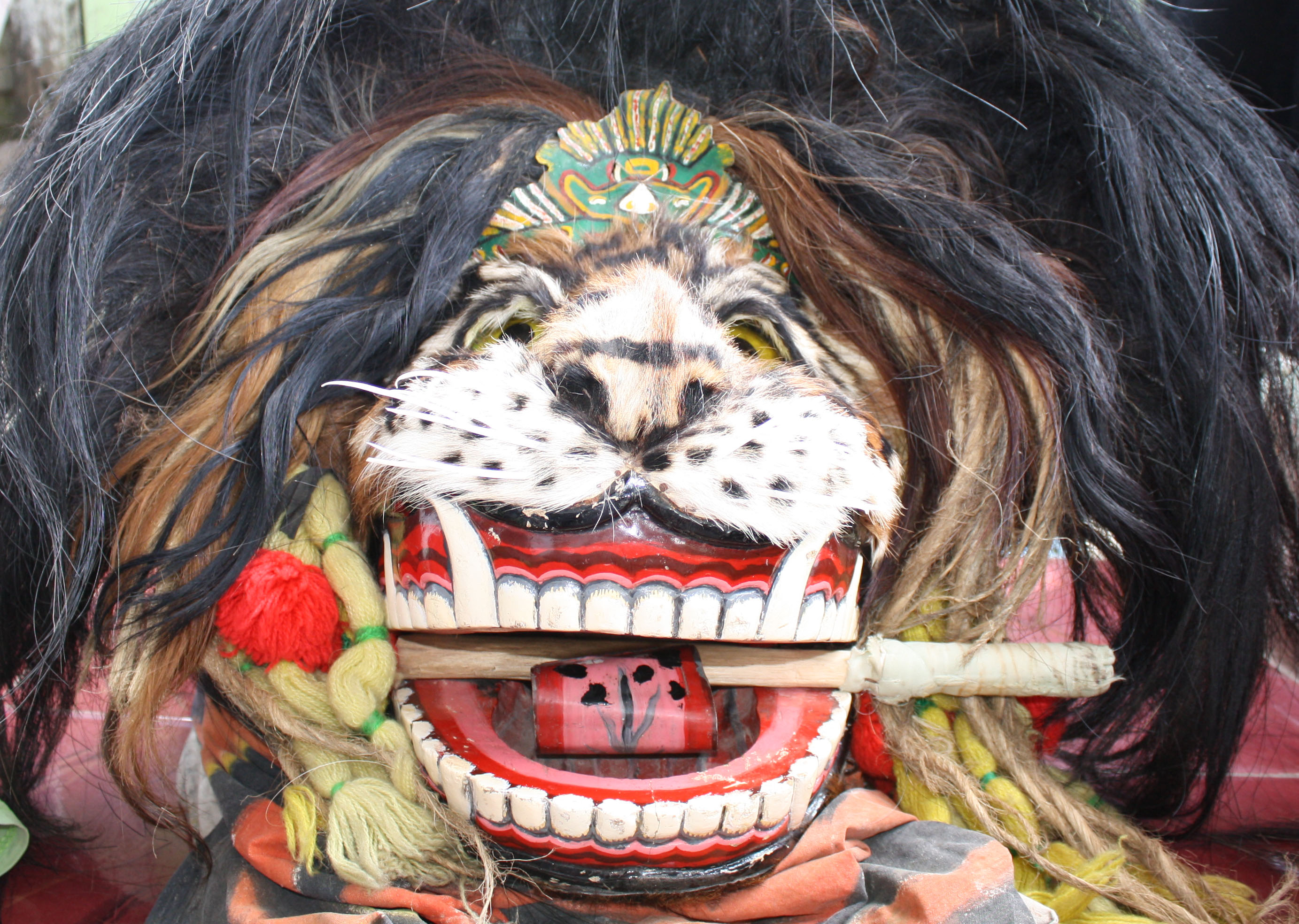 Barongan dari kabupaten blora Jawa Tengah